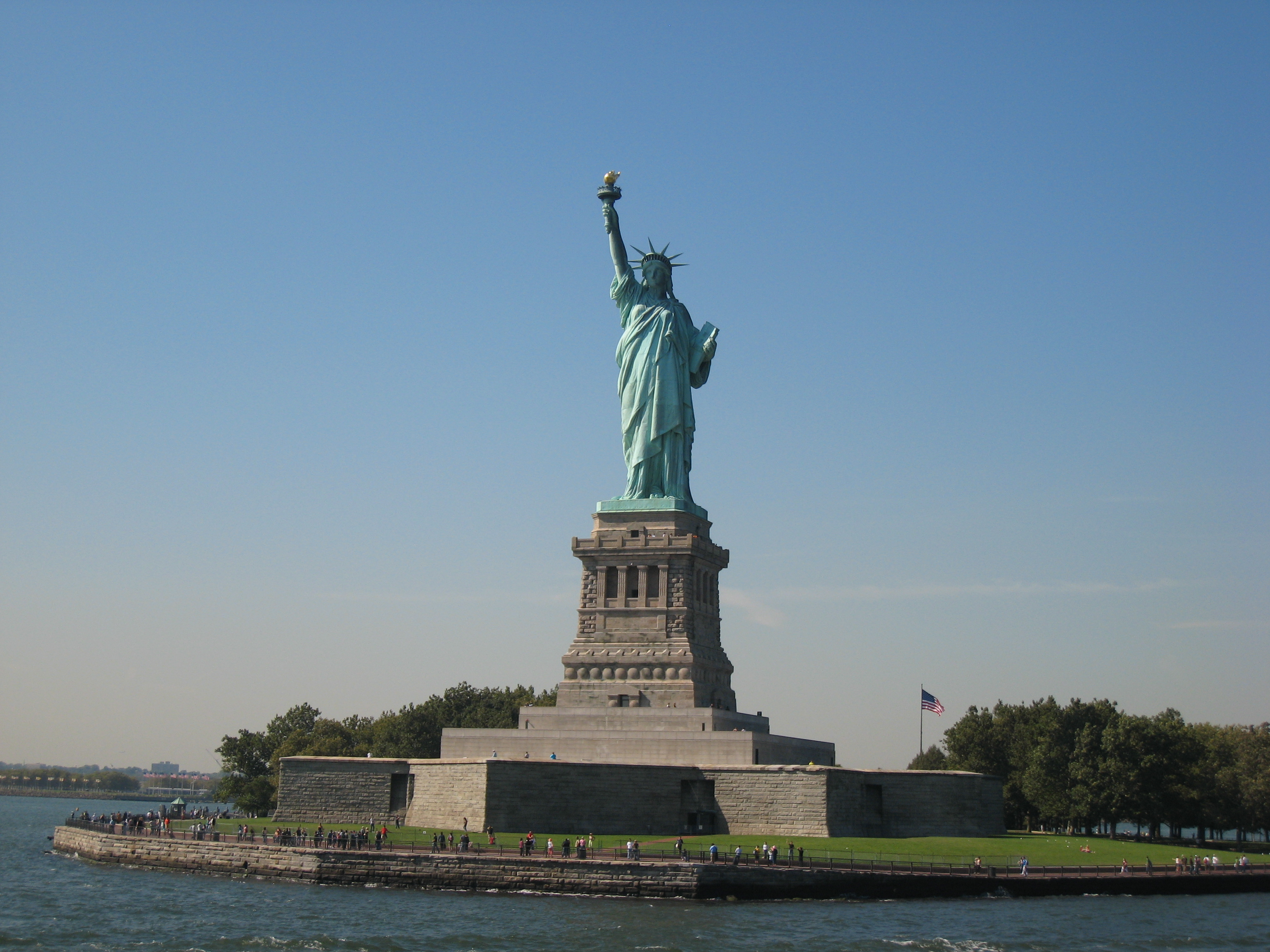 La Statue de la Liberté vue de la navette touristique qui mène à la Statue et à Ellis Island